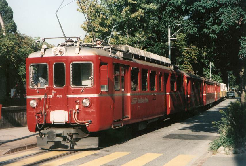 ABDe 4/4 483 der Rhätischen Bahn (auf dem Weg nach Arosa) bei der engen Ortsdurchfahrt in Chur.